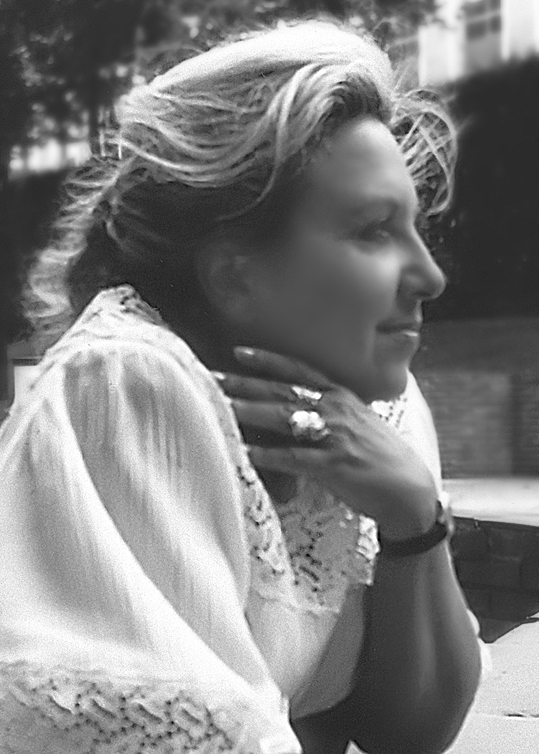 Fotografía de Luzmaría Jiménez Faro. Realizada por su esposo el poeta Antonio Porpetta y cedida por Luzmaría para ser expuesta en su página. Este es el permiso de la escritora: Le ruego tenga la amabilidad de gestionar la inclusión de la fotografía adjunta en mi página de Wikipedia. El autor de la misma es mi esposo ANTONIO PORPETTA, y así deberá constar en los créditos correspondientes. Un cordial saludo y mi agradecimiento, Luzmaría Jiménez Faro. c/Guatemala 14, 6º. A 28016 Madrid.